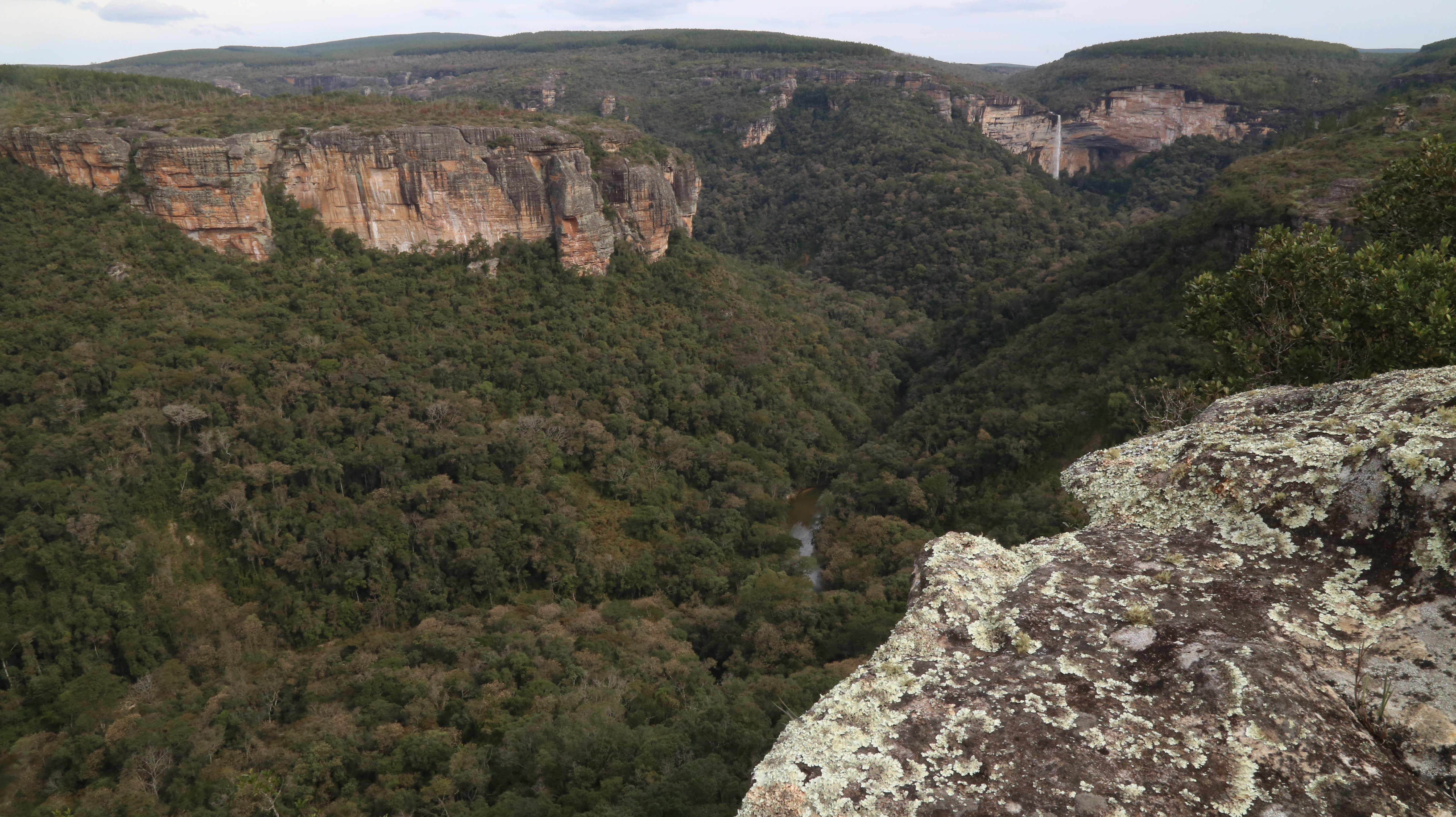 Com 106 metros de queda d'água a Cachoeira do Corisco ao fundo e o Vale do Corisco em Sengés, Paraná, Brasil.